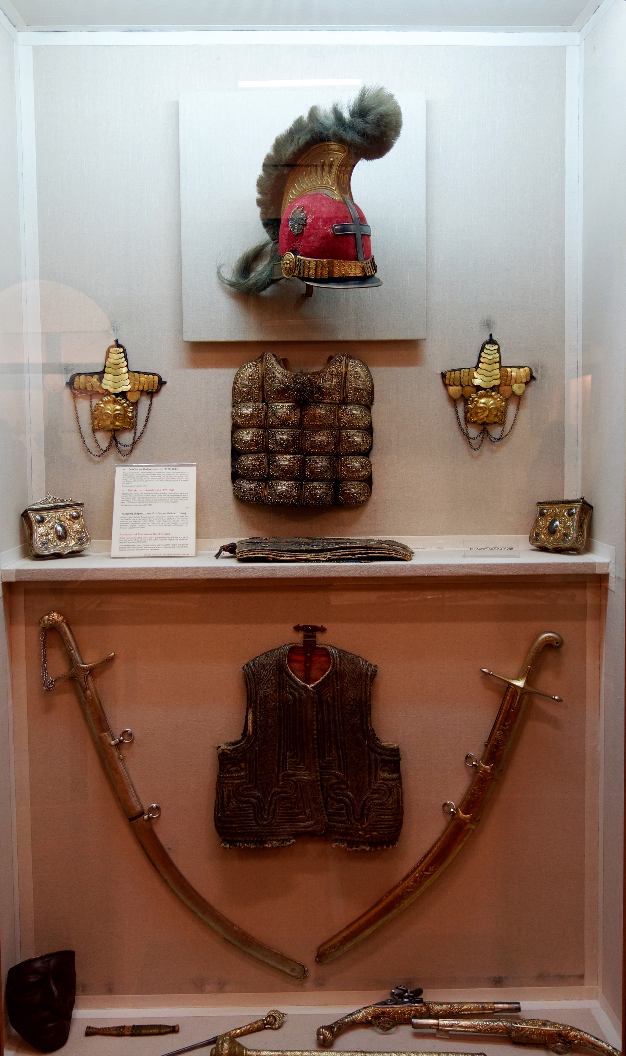 Uniform and personal items of Theodoros Kolokotronisc - Η στολή και προσωπικά αντικέιμενα του Θεόδωρου Κολοκοτρώνη